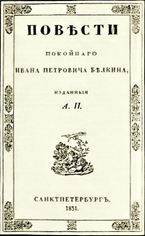 Frontespizio de "Racconti del defunto Ivan Petrovič Belkin